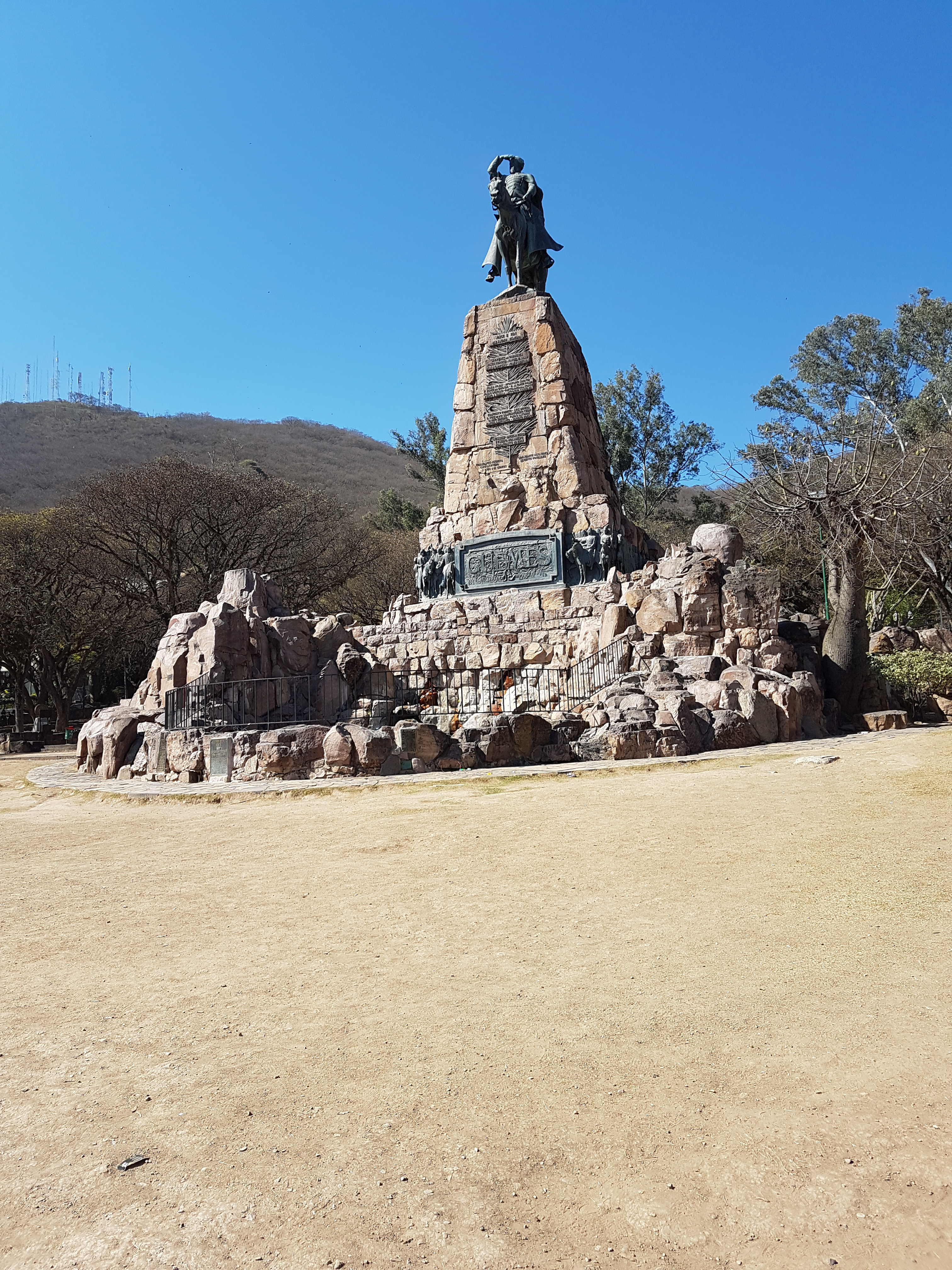 Patrimonio cultural. Monumento